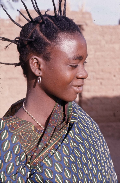 De opname is gemaakt tijdens één van de twee verzamelexpedities die het Tropenmuseum in 1970-1971 ondernam ter voorbereiding op de grote tentoonstelling in 1971-1972, getiteld 'Samo. Een Afrikaans Savannevolk in ontwikkeling'. De expedities duurden elk drie maanden en werden uitgevoerd door de heren J.T. Broekhuijse en F.M. Cowan. Een portret van deze vrouw staat ook afgebeeld in de catalogus bij de hierboven genoemde tentoonstelling met het bijschrift 'Samomeisje' (1971: 30 en 31).